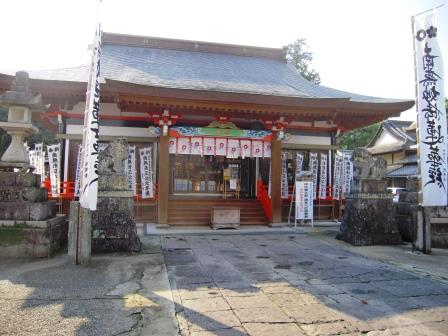 加藤清正を祀る本妙寺浄池廟拝殿（熊本市）